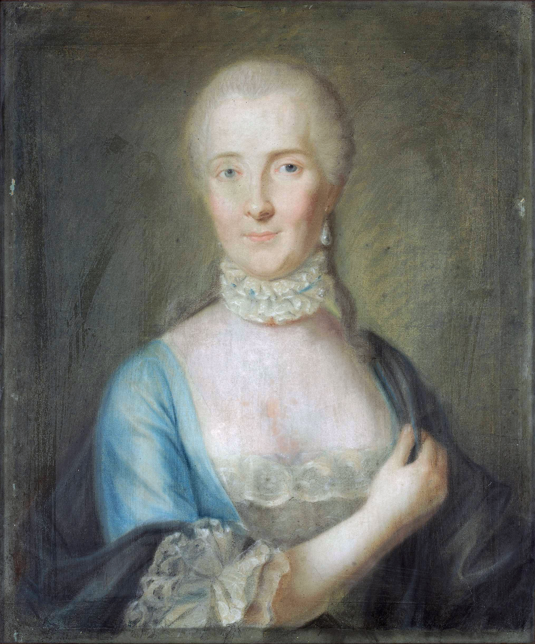 label QS:Lbe-tarask,"Партрэт Генавэфы Бжастоўскай (Gienavefa Bžastoŭskaja) з князёў Агінскіх (Aginski)"